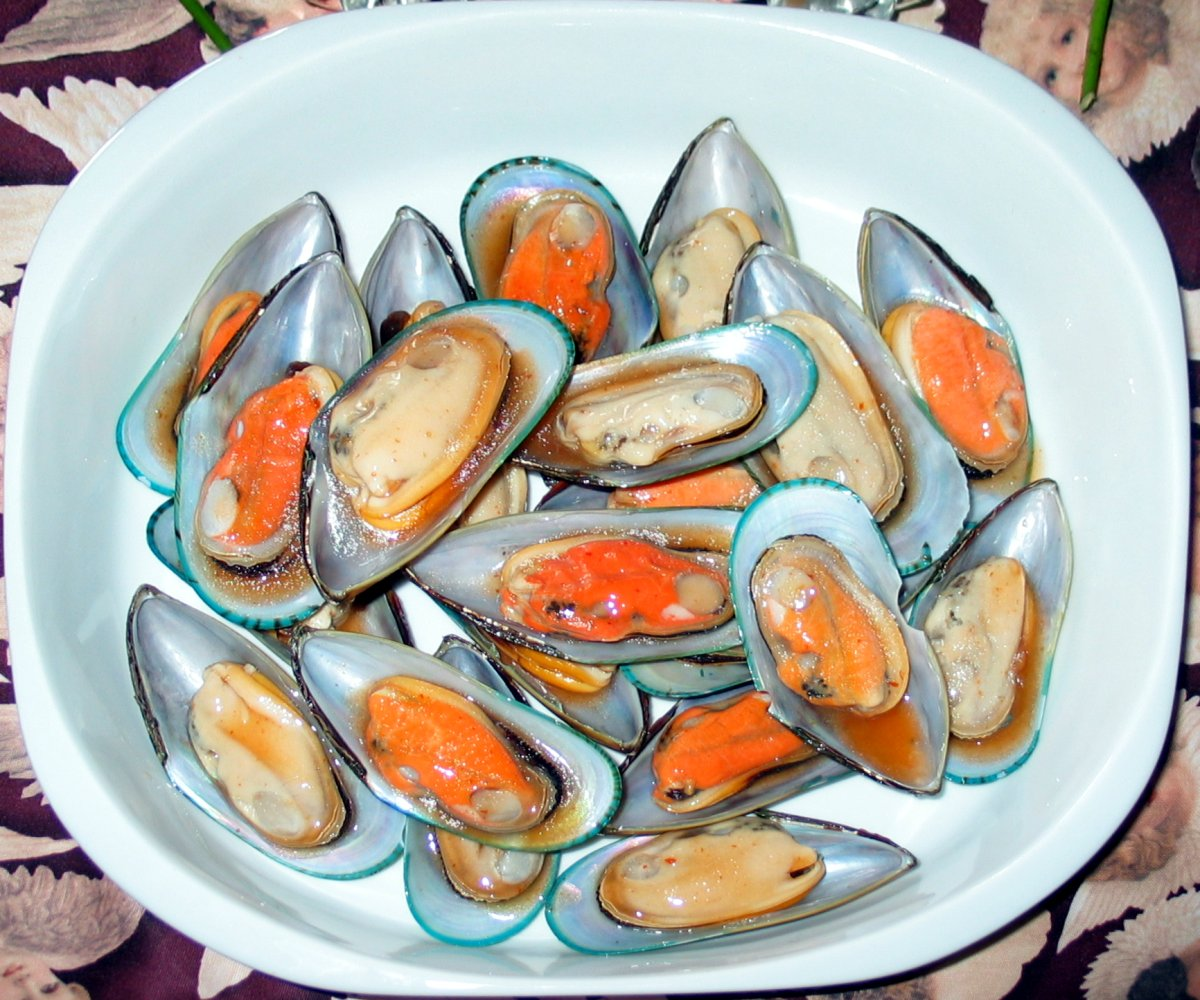 Muslinger (blåmuslinger) som mad